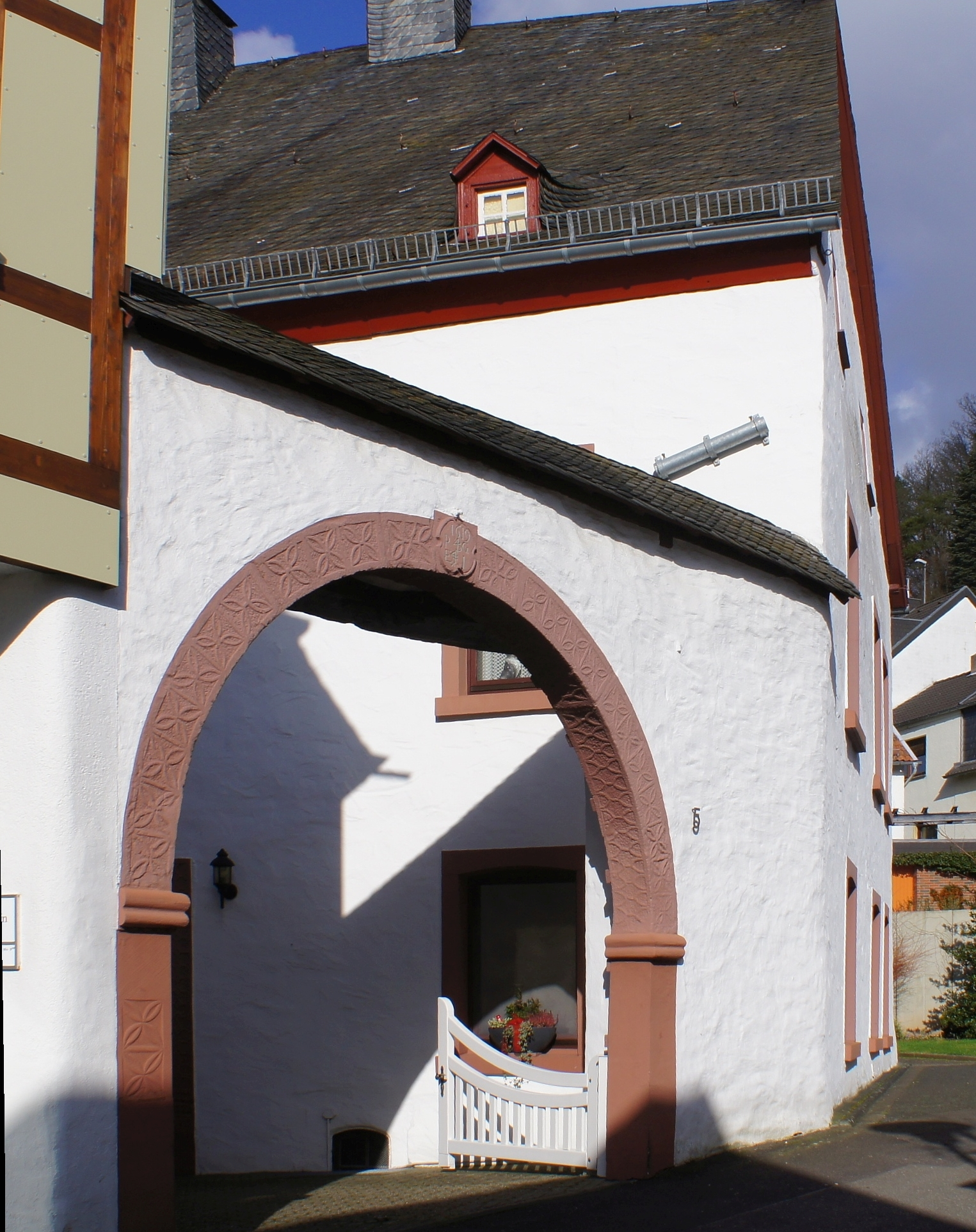 Baudenkmal, Schleiden Gemünd, "Trutzburg" Bergstraße 5